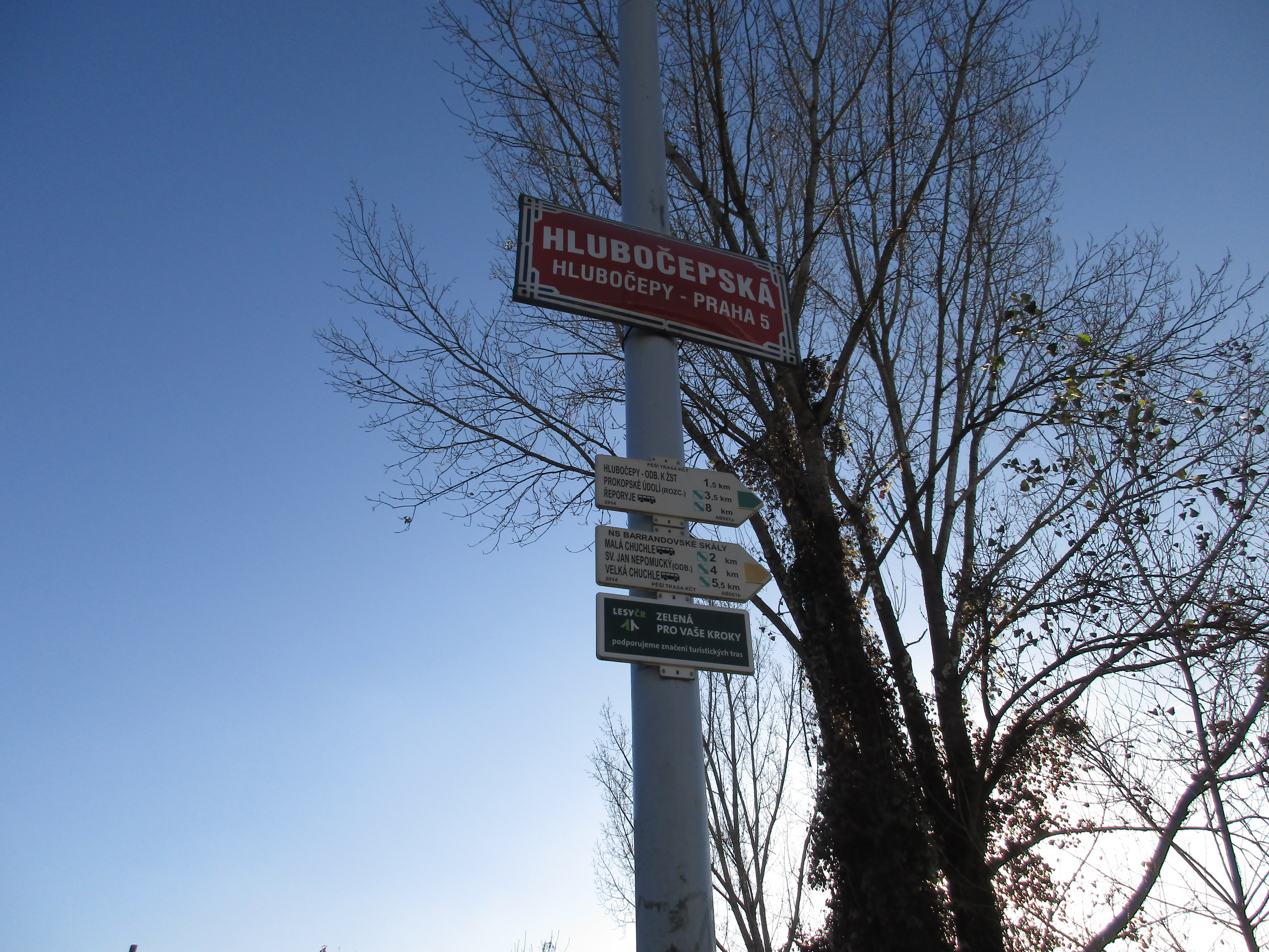 Rozcestník v Hlubočepské ulici.